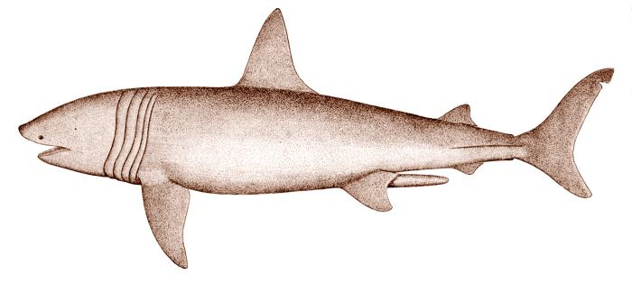 Brugde, hann, fra en: "Male Basking Shark (Cetorhinus maximus)".